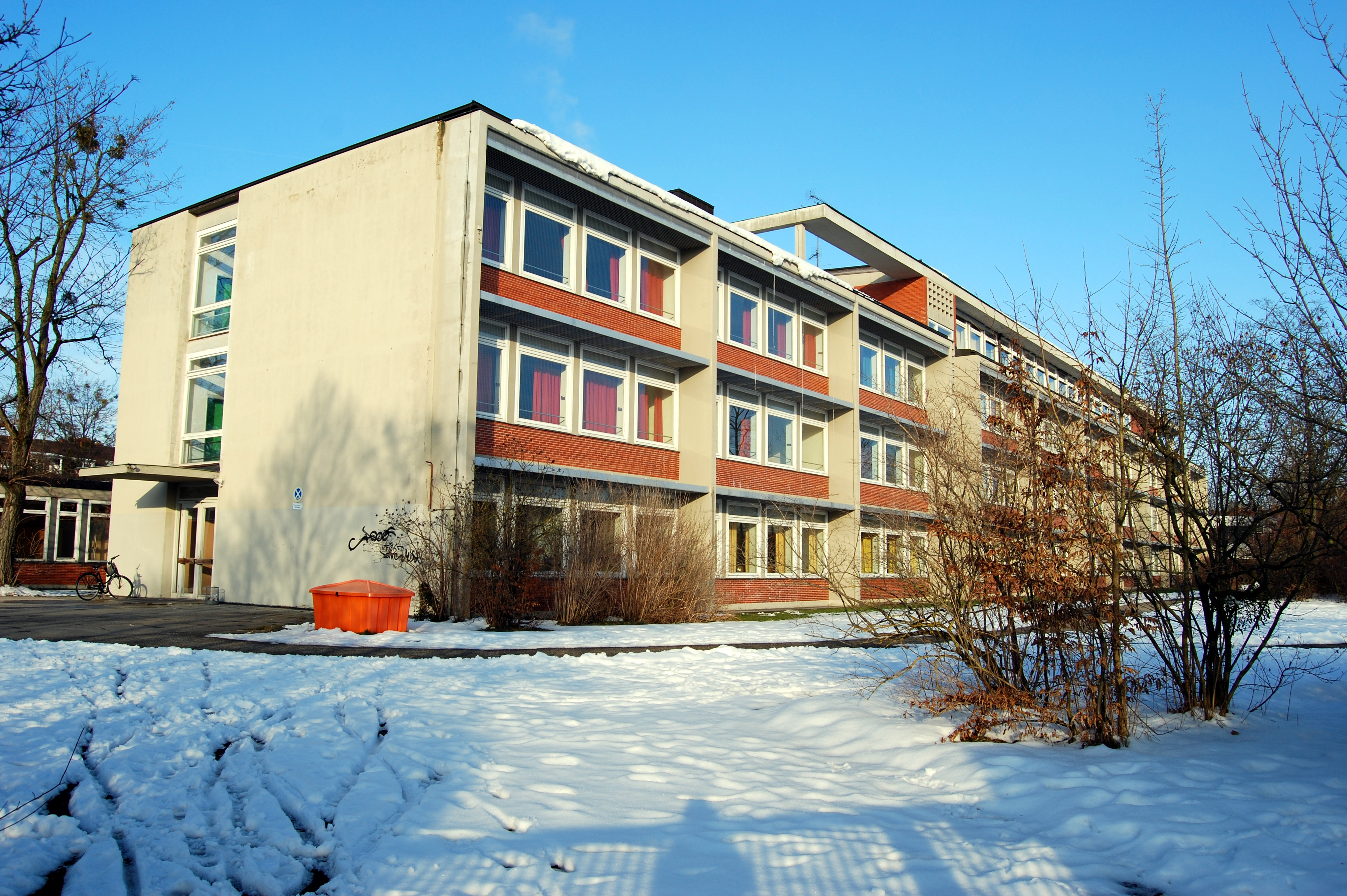 Käthe-Kollwitz-Gymnasium in München-Neuhausen, Nibelungenstraße 51